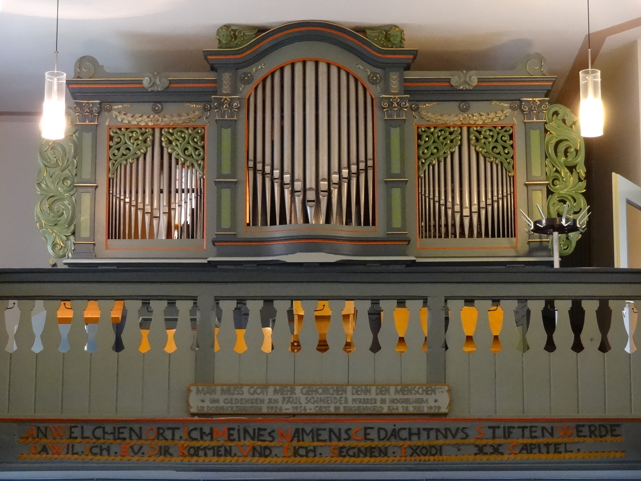 Evangelische Kirche Hochelheim